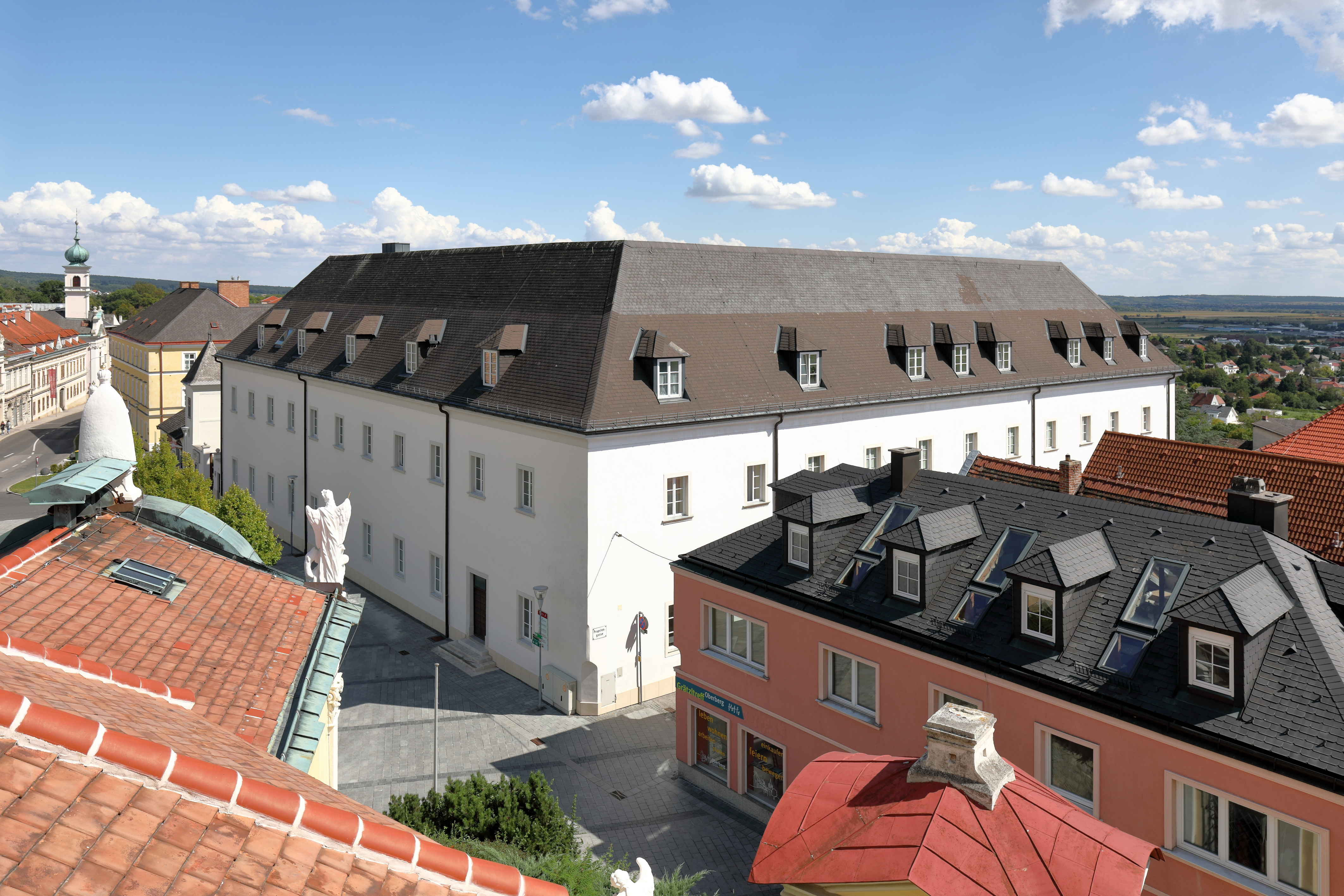 Blick vom Kalvarienberg auf das Haus der Begegnung in der burgenländischen Landeshauptstadt Eisenstadt. Der zweigeschossige 4-Flügel-Bau um einen quadratischen Hof wurde als Franziskanerkloster von 1757 bis 1766 errichtet. Nach Aufhebung des Klosters 1787 war ab 1794 darin die Schlosspropstei untergebracht (Sitz des Pfarrers der Pfarrgemeinde Schlossgrund-Oberberg) und seit 1969 wird das Gebäude von der Diözese Eisenstadt als Haus der Begegnung genutzt.